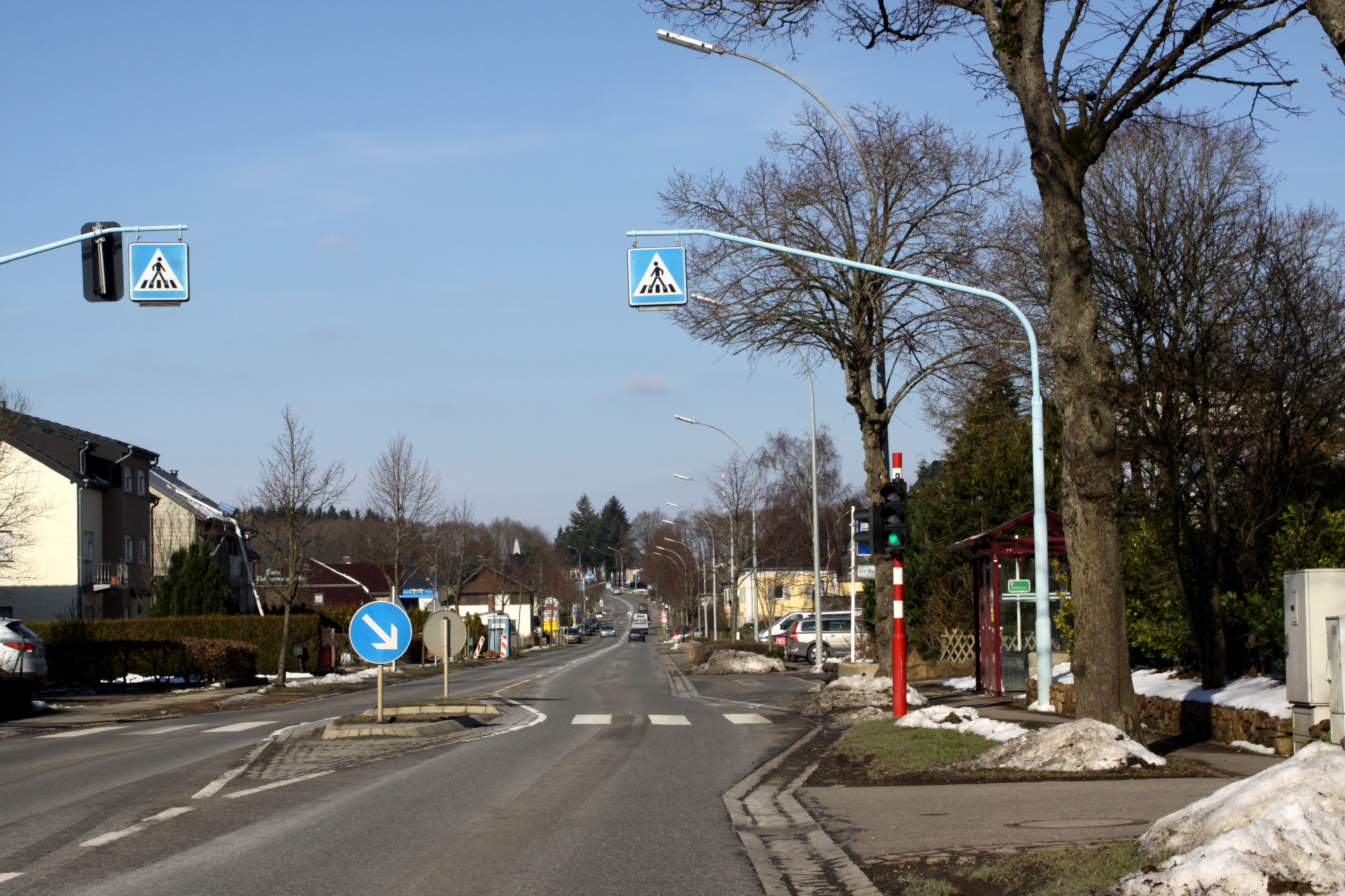 D'Houschterdéckt am Februar 2013